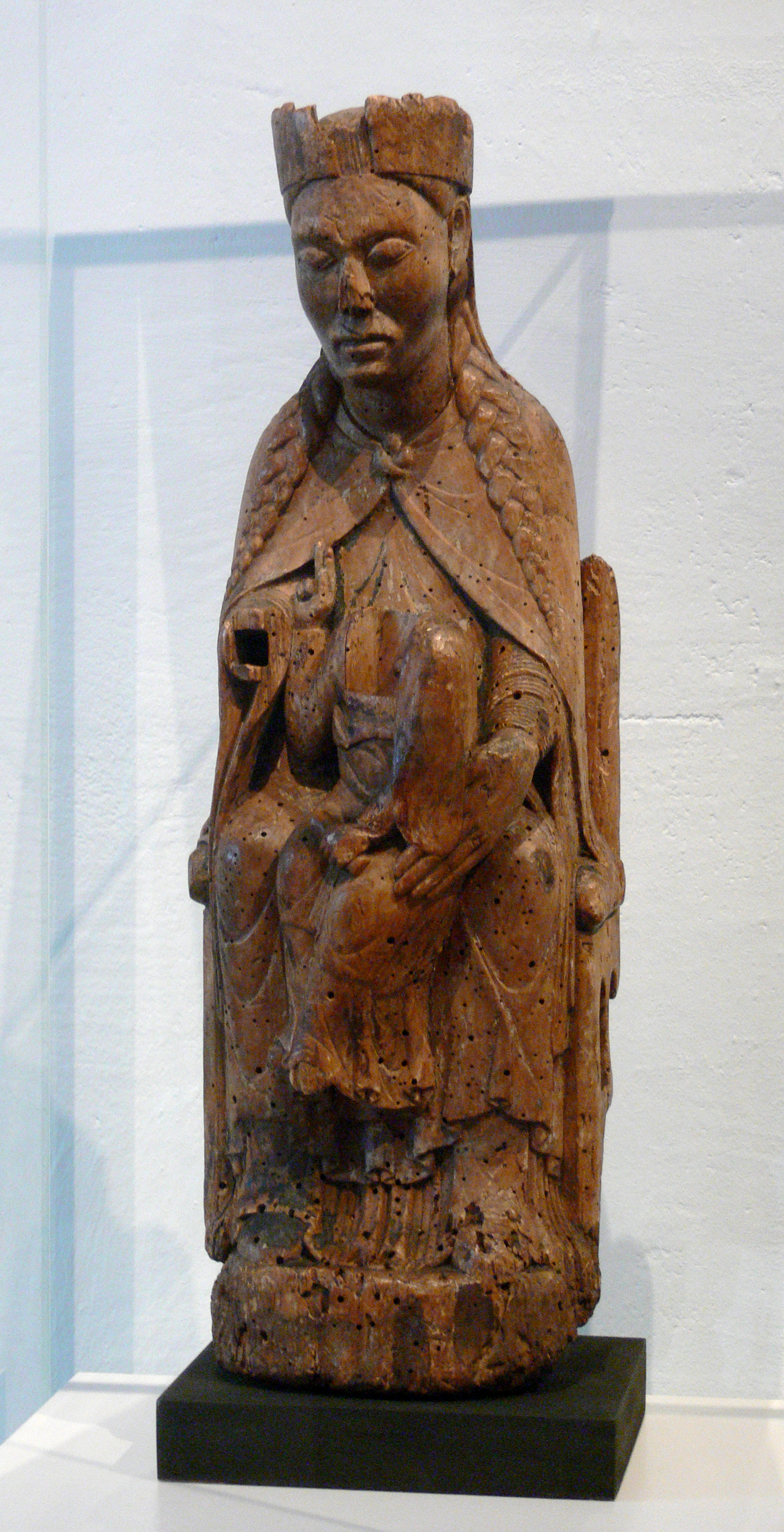 Thronende Madonna, um 1160-1170, Laubholz (wenige Reste alter Fassung), aus Otzdorf (Gde. Niederstriegis) bei Döbeln Staatliche Kunstsammlungen Dresden, Skulpturensammlung, SAV 2751 (ausgestellt im Schloßbergmuseum Chemnitz)